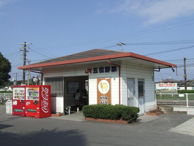 JR五位野駅の駅舎写真